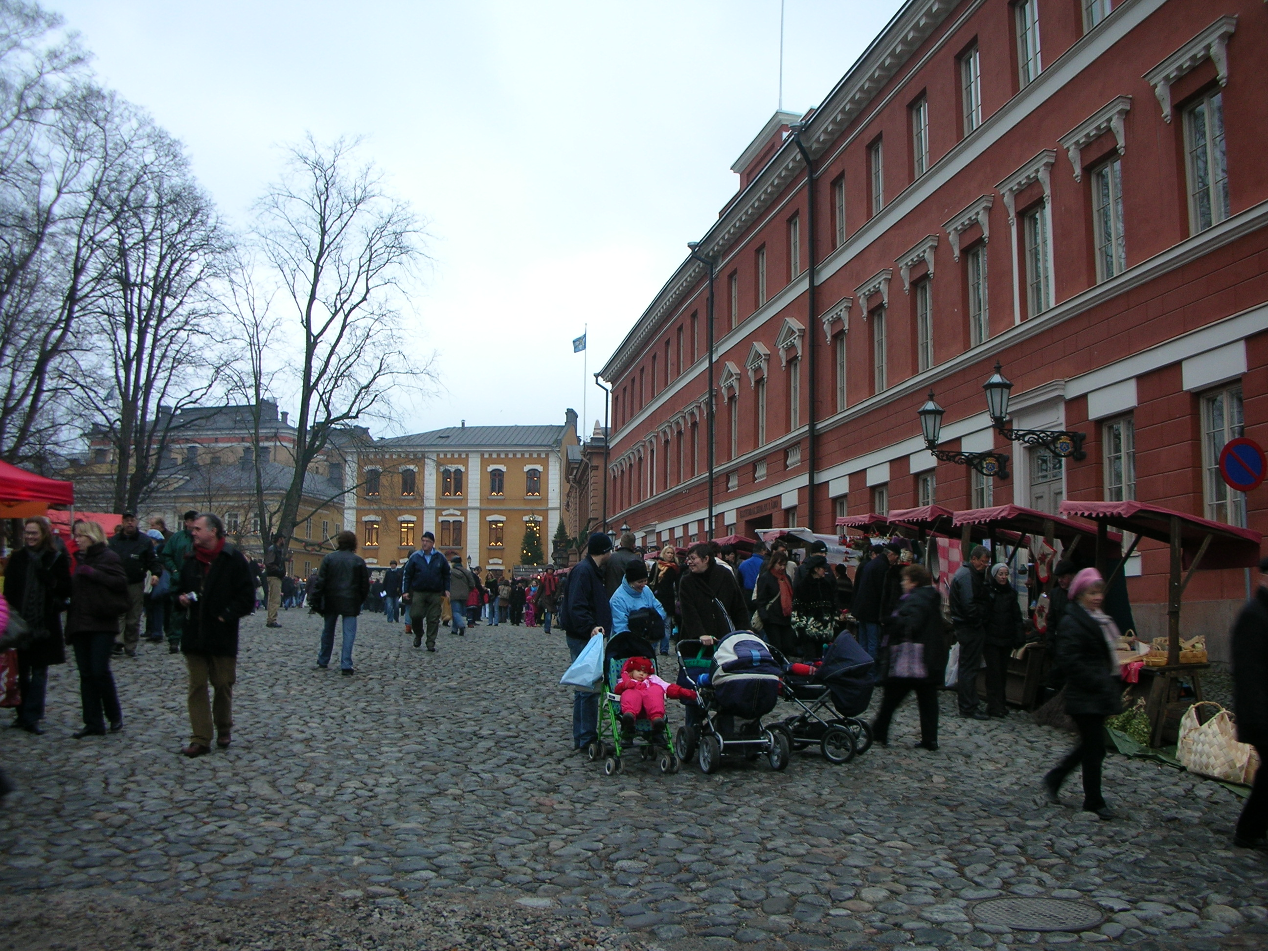 Joulumarkkinat Turun Vanhalla Suurtorilla. Oikealla Katedralskolan.